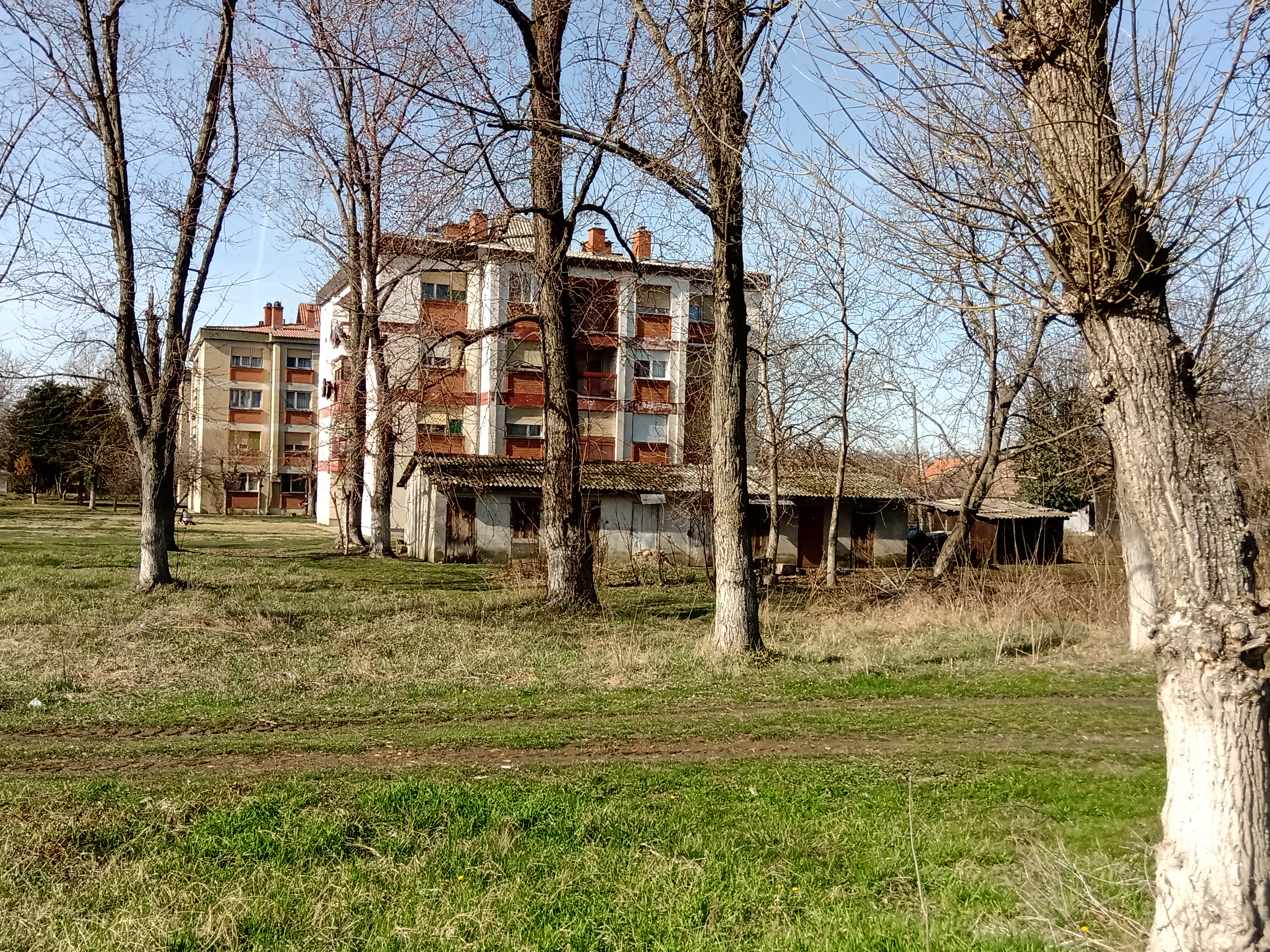 Насеље Бесни Фок